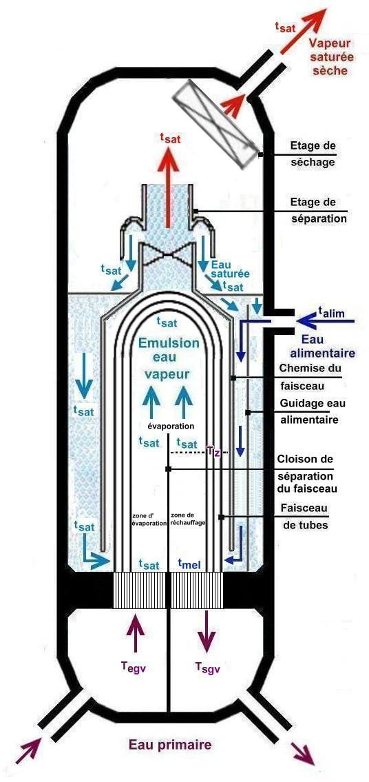 Fonctionnement coté secondaire d'un générateur de vapeur à tubes en U à économiseur axial